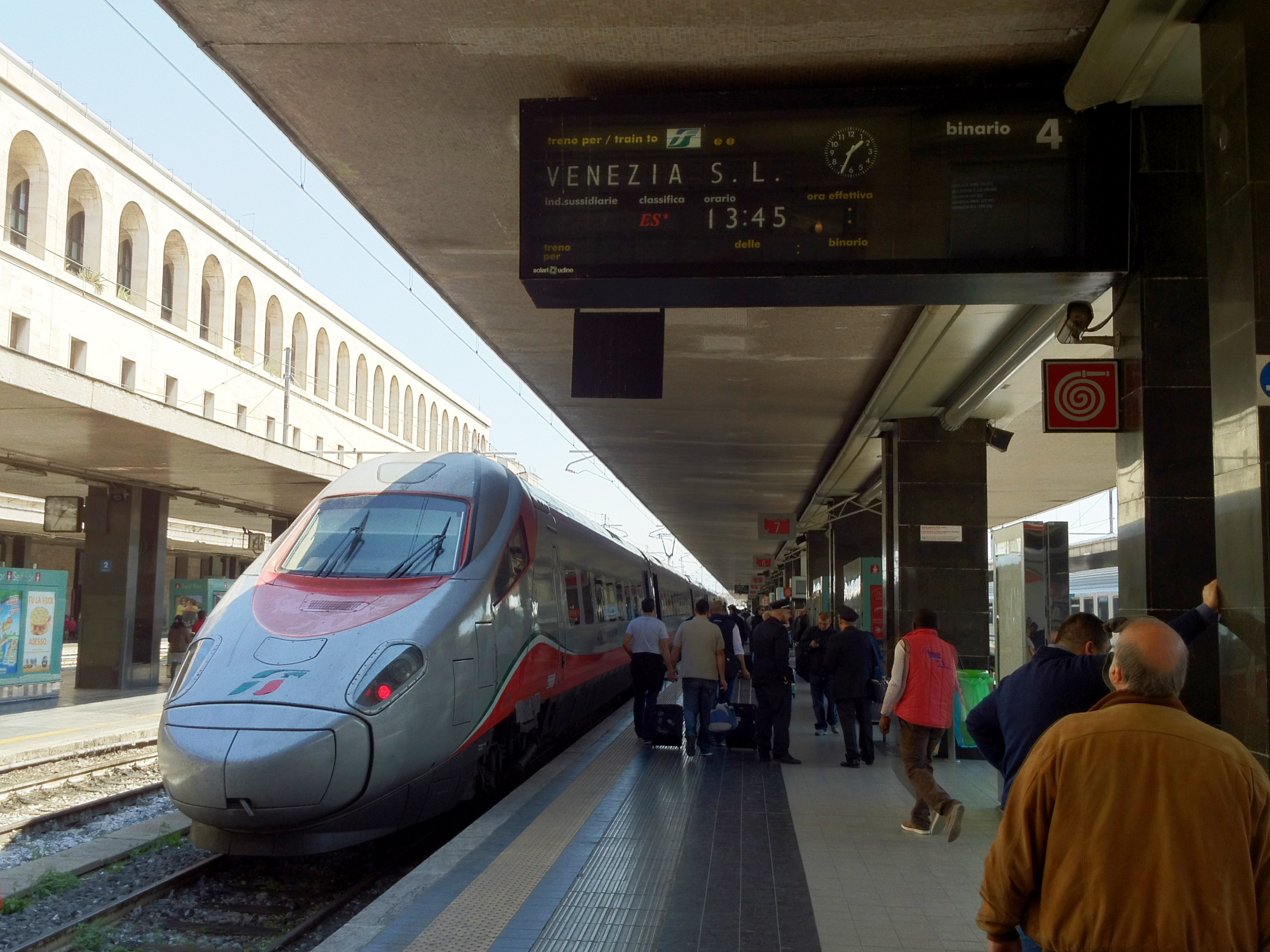 Elettrotreno ETR 600 delle Ferrovie dello Stato in sosta a Roma Termini